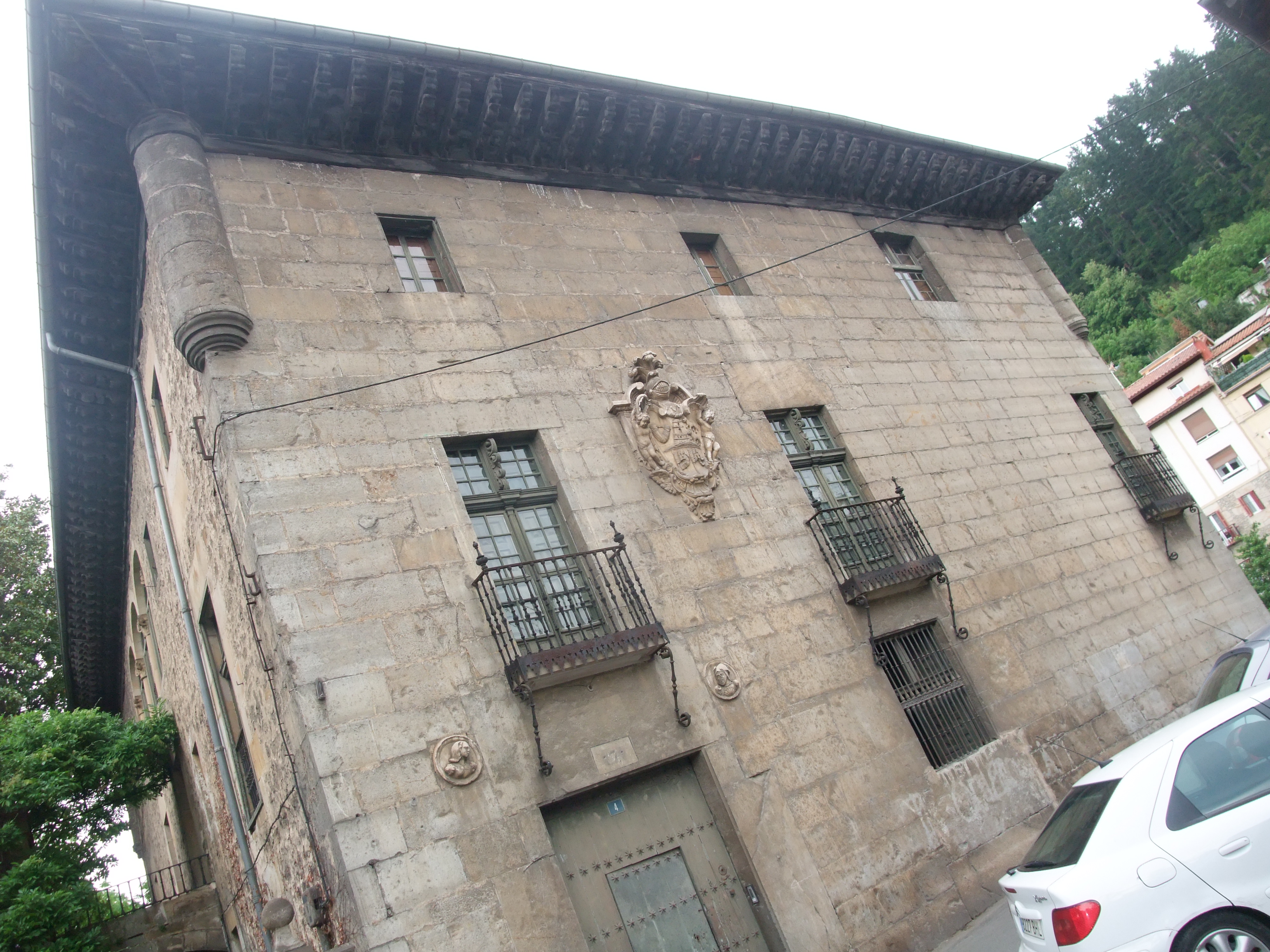 Vergara (Guipúzcoa)-Casa Laureaga-1